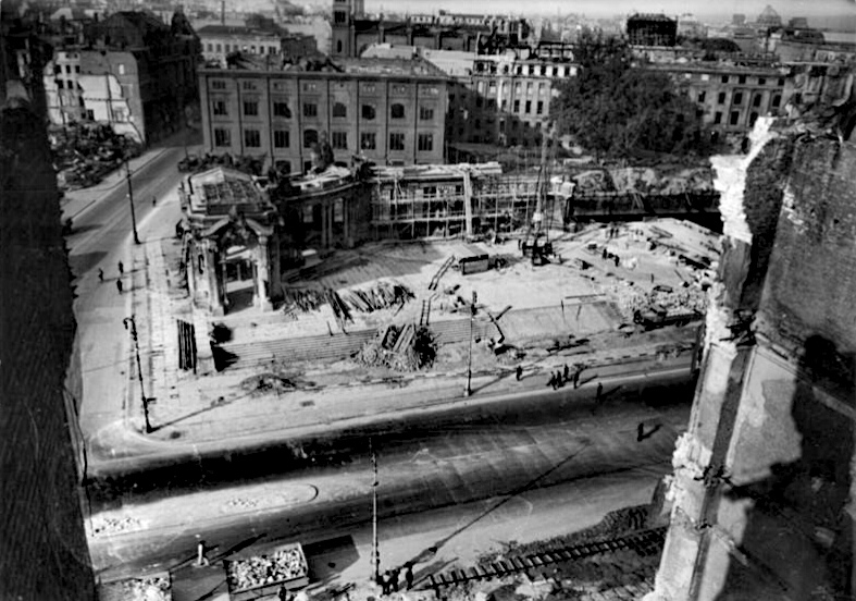 Illus-Igel-Kemlein Kno-Leu. 11.10.50 Abriss der Schlossruine in Berlin. UBz: Blick aus der Schlossruine auf den Abbau der Schlossfreiheit.